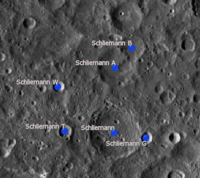 Cráter lunar Schliemann. Cráteres satélite. (Imagen LRO)